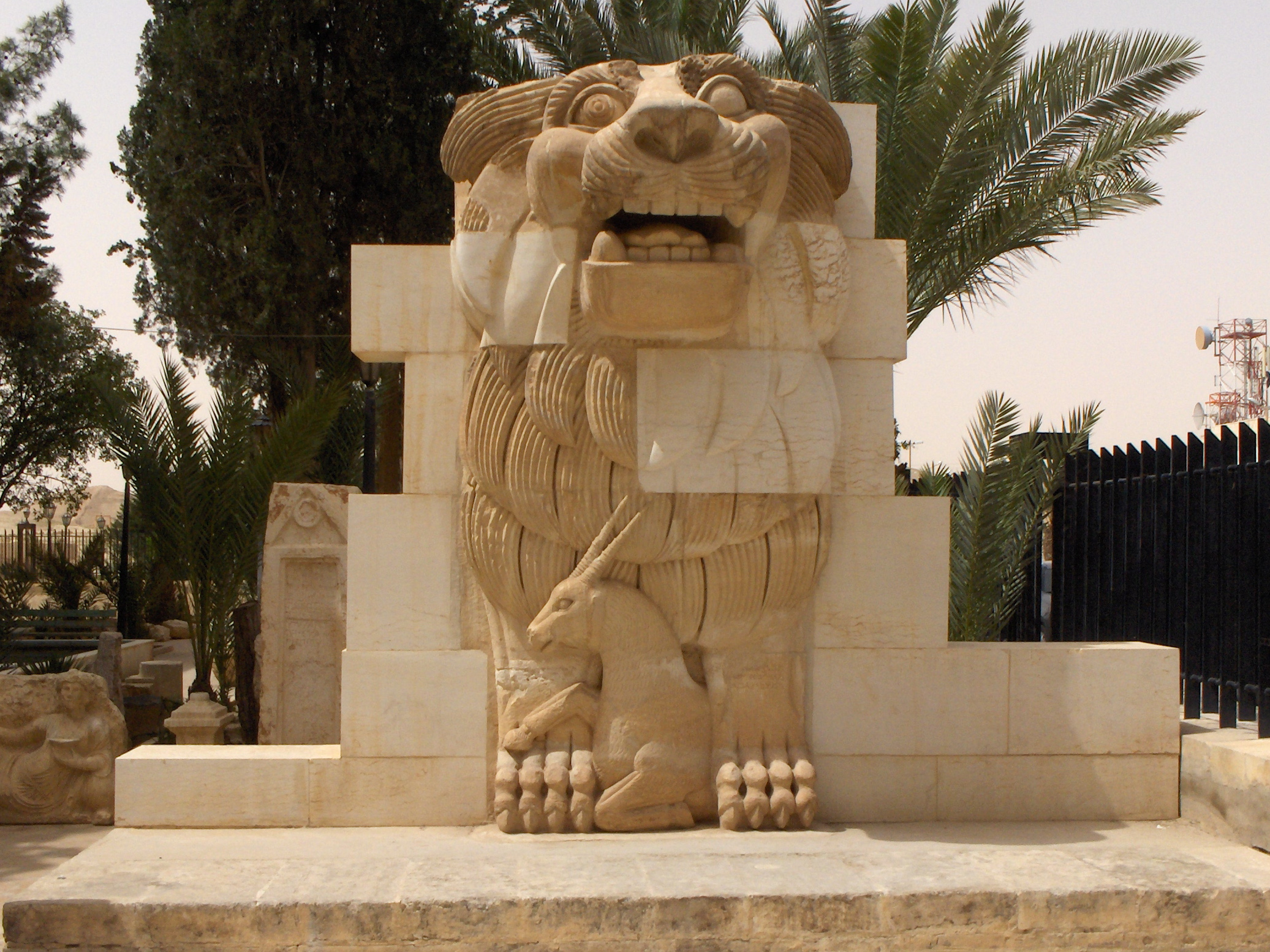 منحوتة لِأسد اللَّات تعود إلى القرن الأوَّل ق.م. معروضة في حديقة المتحف الأثري بِمدينة تدمر.